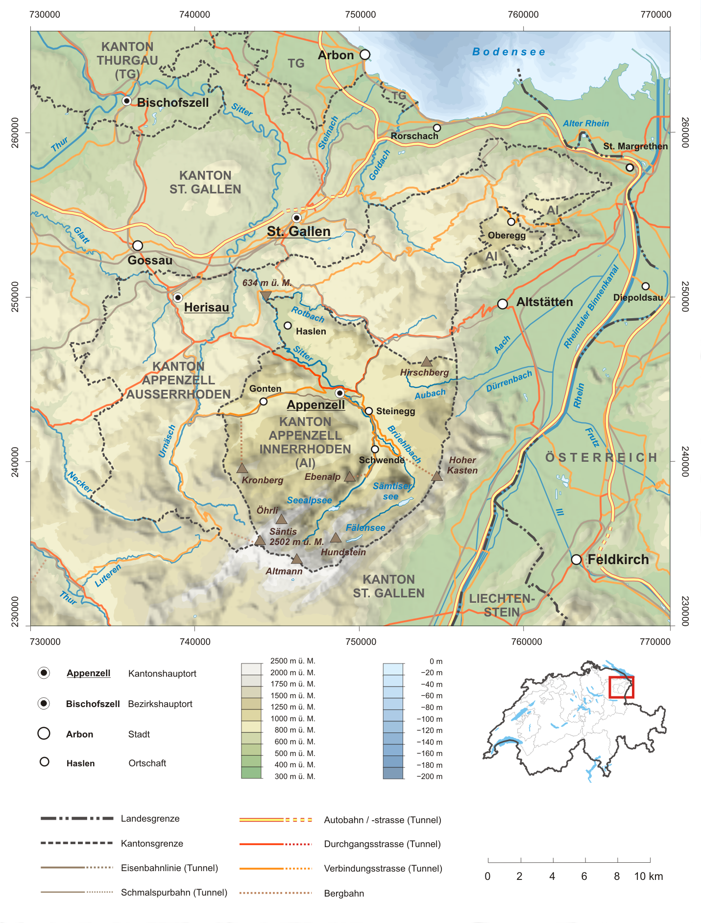 Karte des Kanton Appenzell Innerrhoden. Topographischer Hintergrund: NASA Shuttle Radar Topography Mission (public domain). SRTM3 v.2.